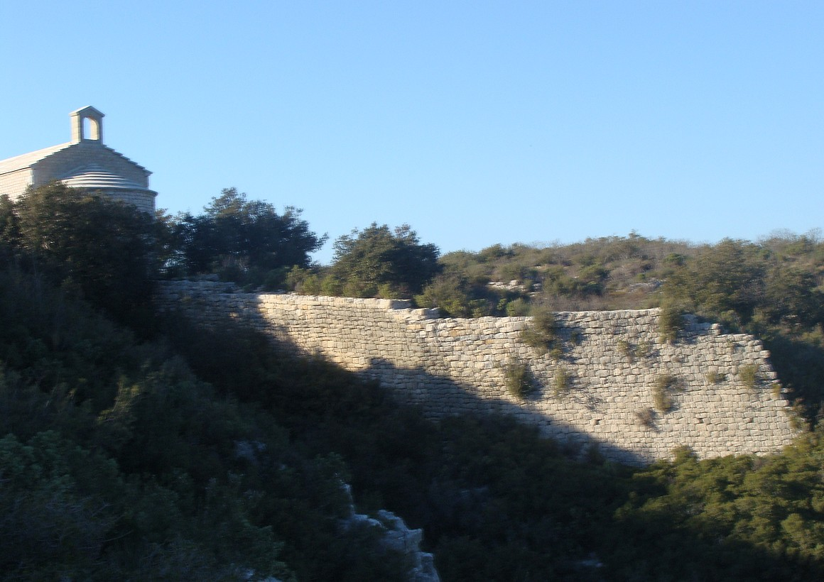 Vestiges des anciennes constructions qui entouraient à l'origine la chapelle Saint-André-de-Julhans.